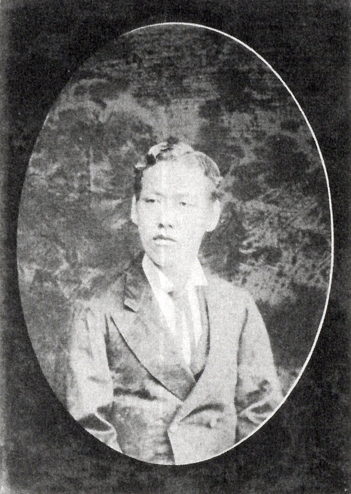 織田信及の肖像写真。